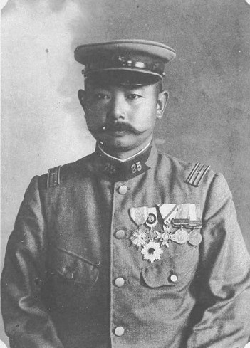 永山武敏男爵（1871～1938）